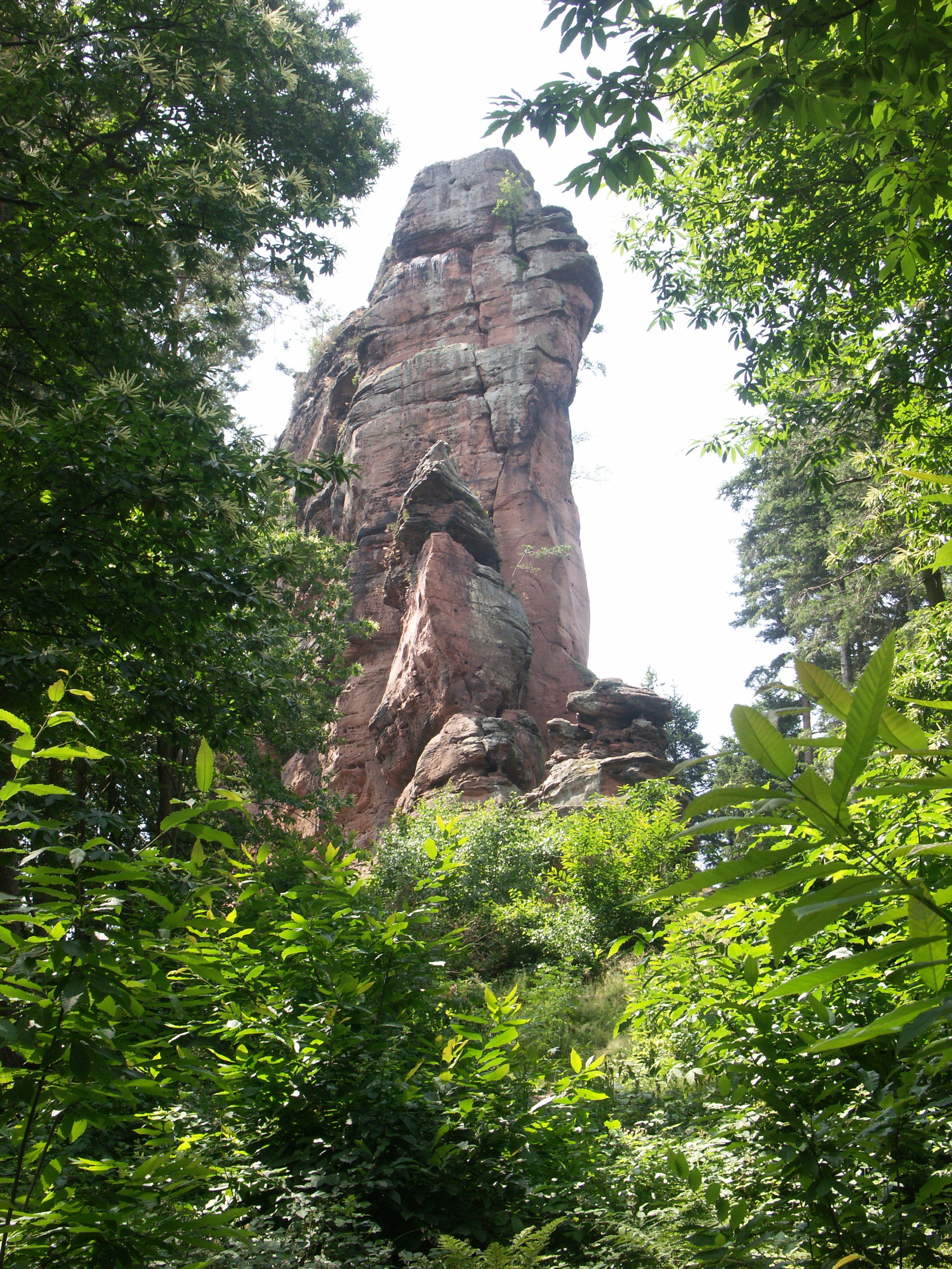 Deutschland, Rheinland-Pfalz, Südpfalz, Annweiler am Trifels, Ostwand des Asselsteins